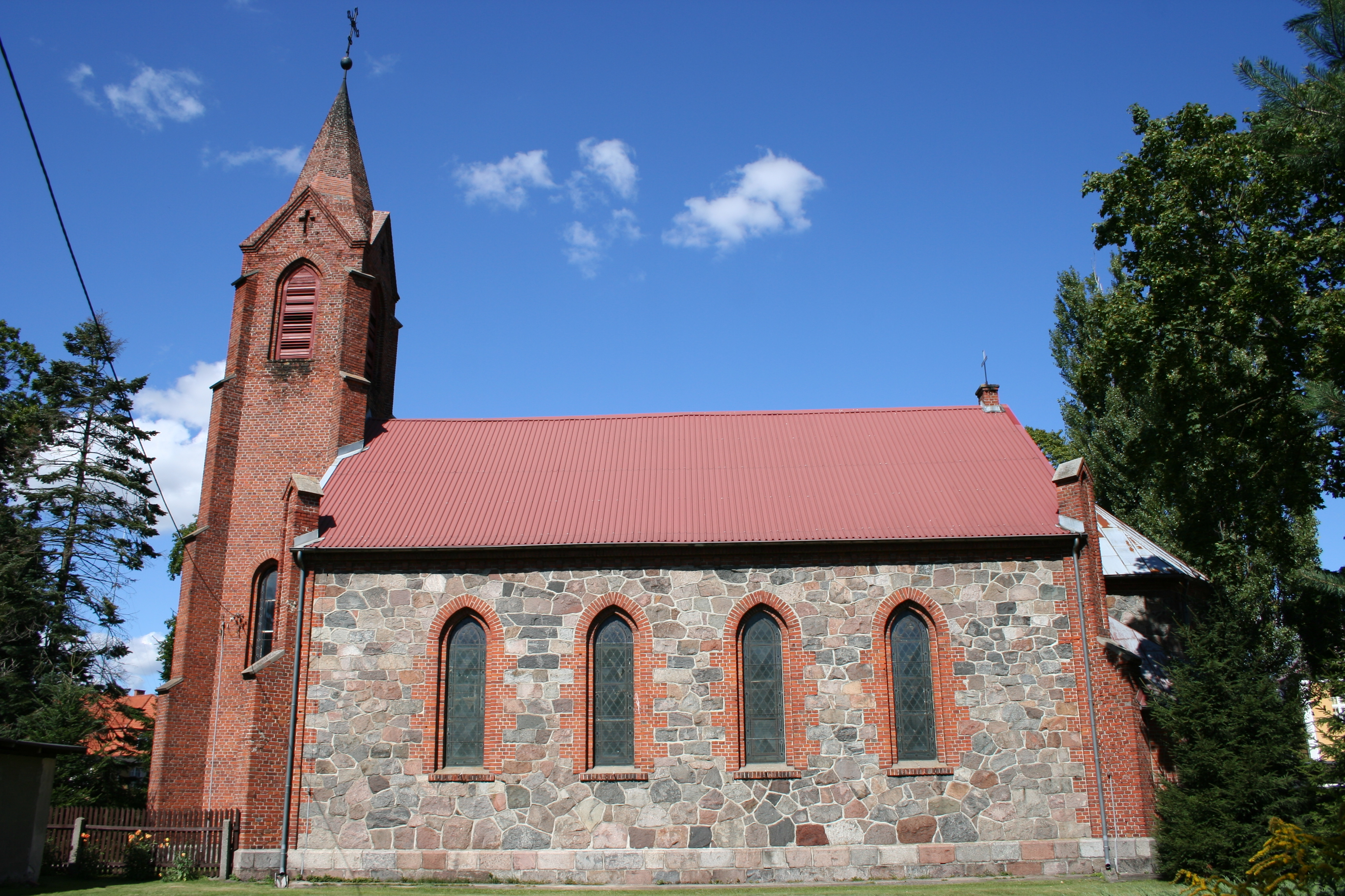 Nidzica, kościół ewangelicko-augsburski, 1858-1890